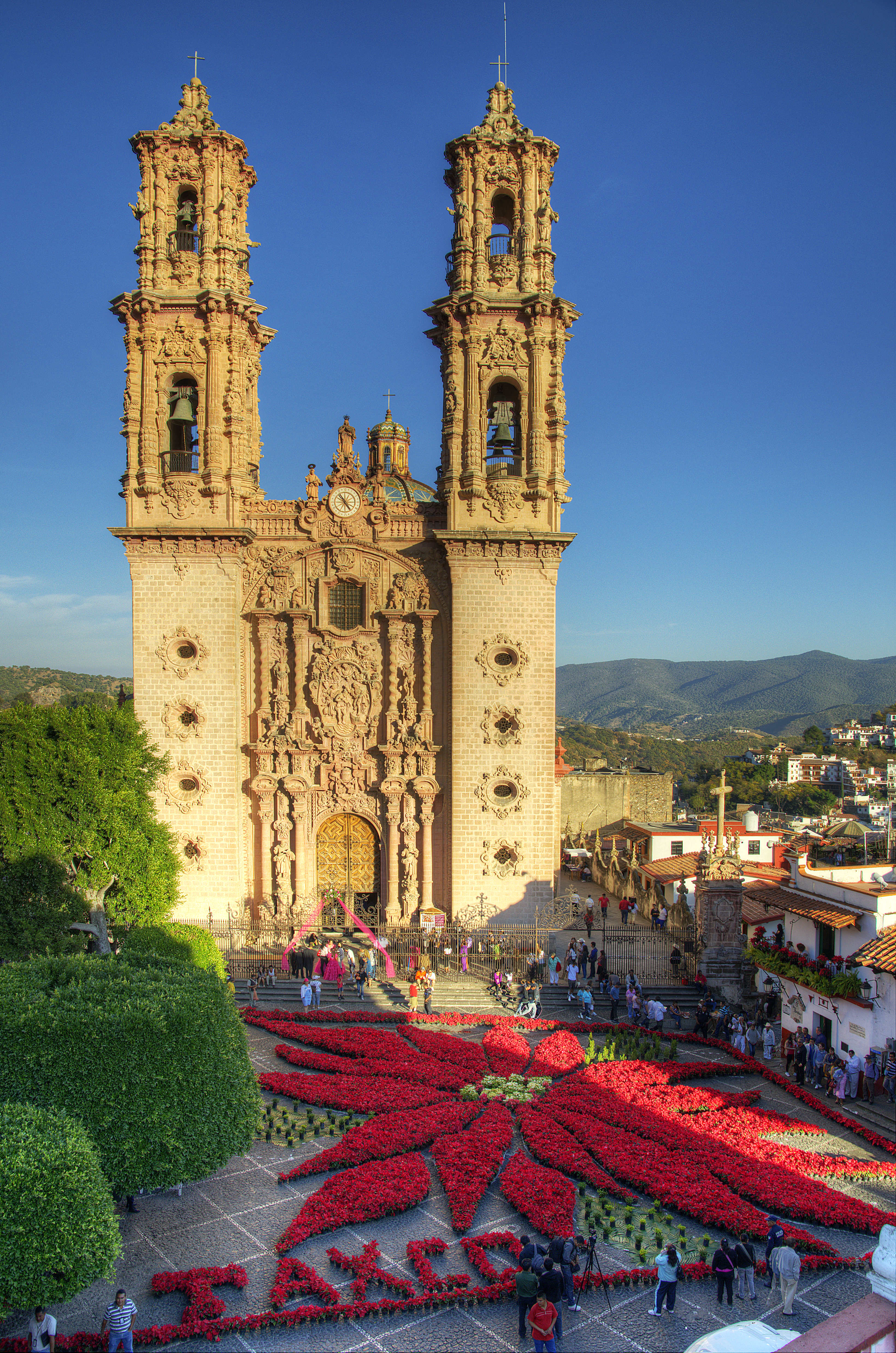 Iglesia de Santa Prisca, Taxco, Guerrero/ Santa Prisca Church, Taxco, Guerrero